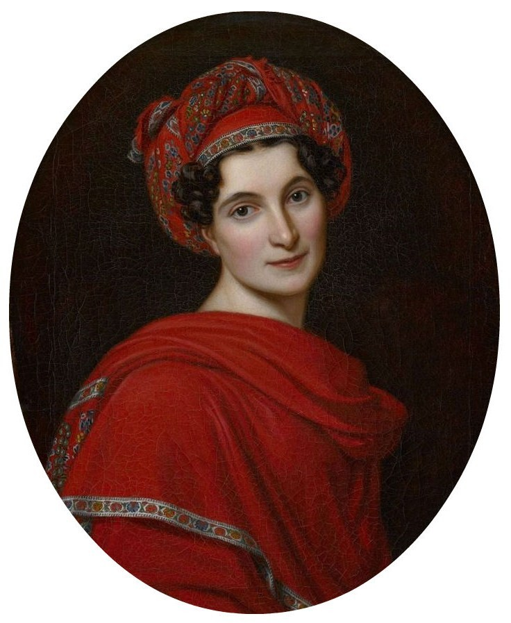 Тереза Александра фон Теттенборн (1788—1876)